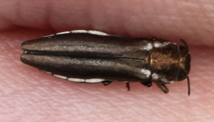 Umrandeter Schmalprachtkäfer (Agrilus cinctus) an Besenginster, am 12. Juni 2018 in der Schwetzinger Hardt